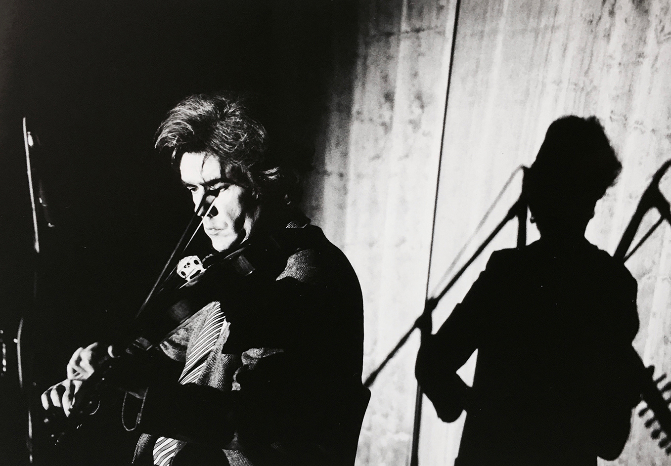 1988年日本でVIOLECTRAを演奏するJohannes Fritsch